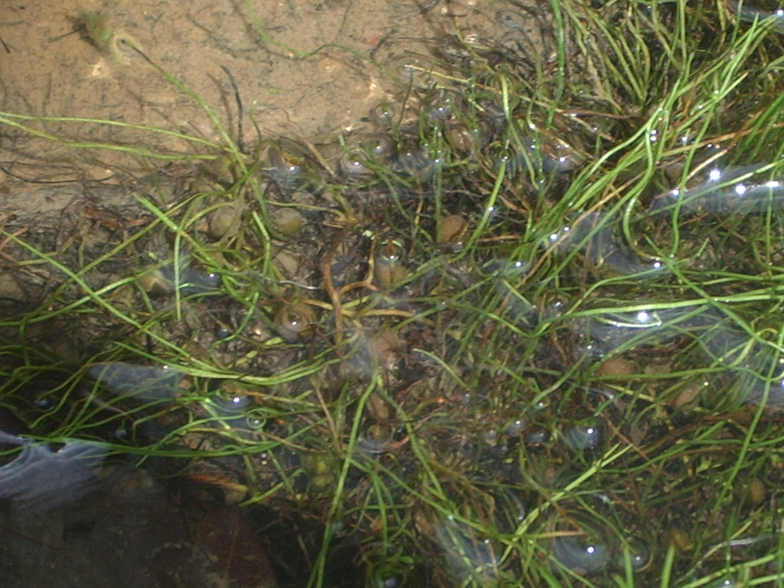 Appareil végétatif et globules